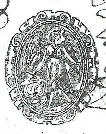 Marca de impresor de Tomás Porralis de Saboya, Pamplona, ca. 1590